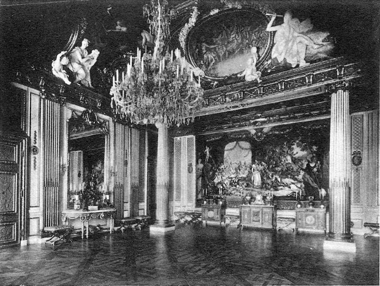 Gustav III:s paradsängkammare, Stockholms slott.